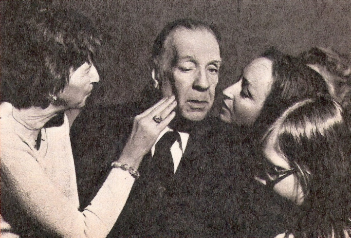 Jorge Luis Borges, escritor argentino, rodeado de fans